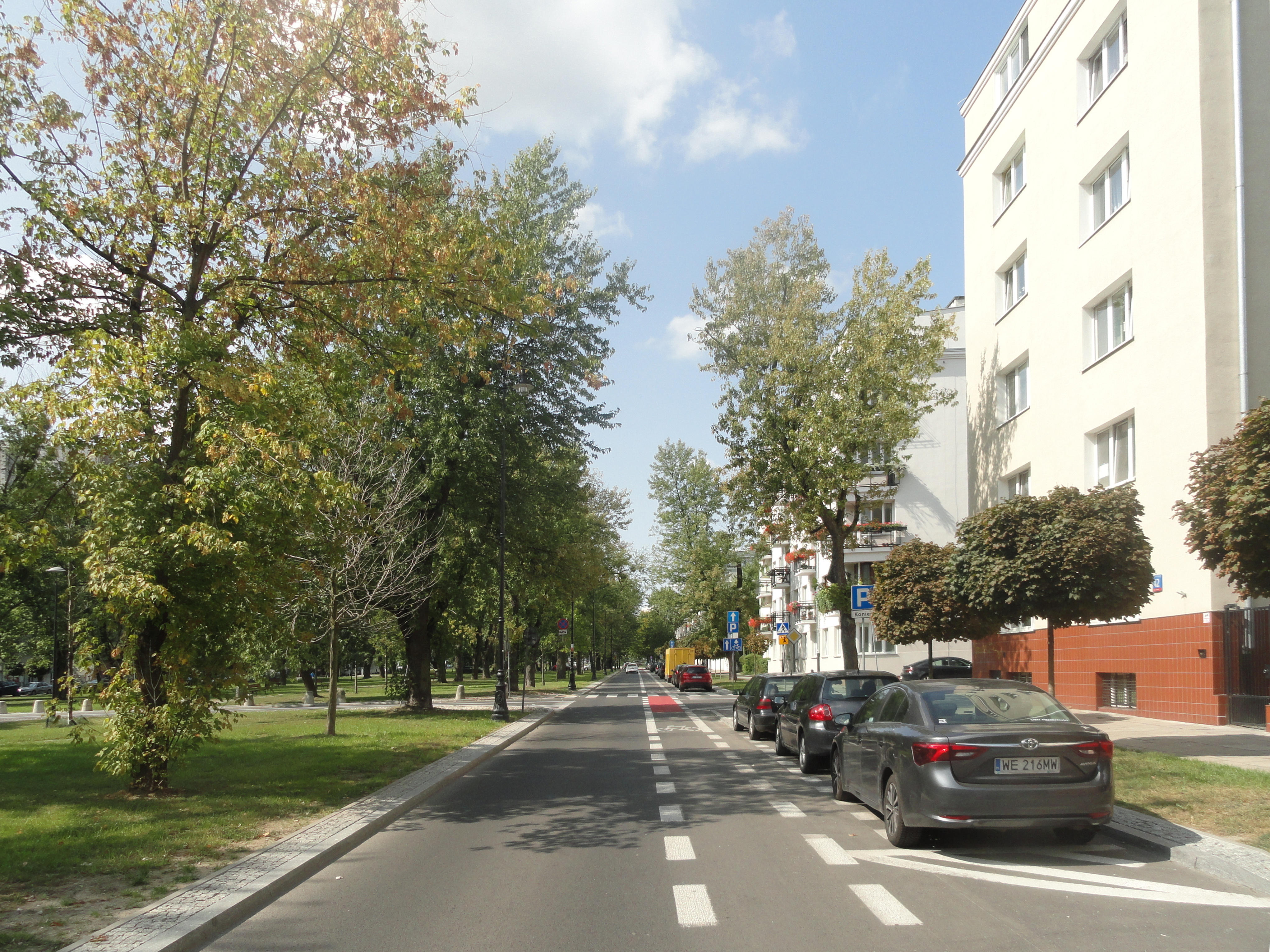 Aleja Wojska Polskiego w Warszawie przed Kozietulskiego w kierunku placu Grunwaldzkiego, jezdnia północna.